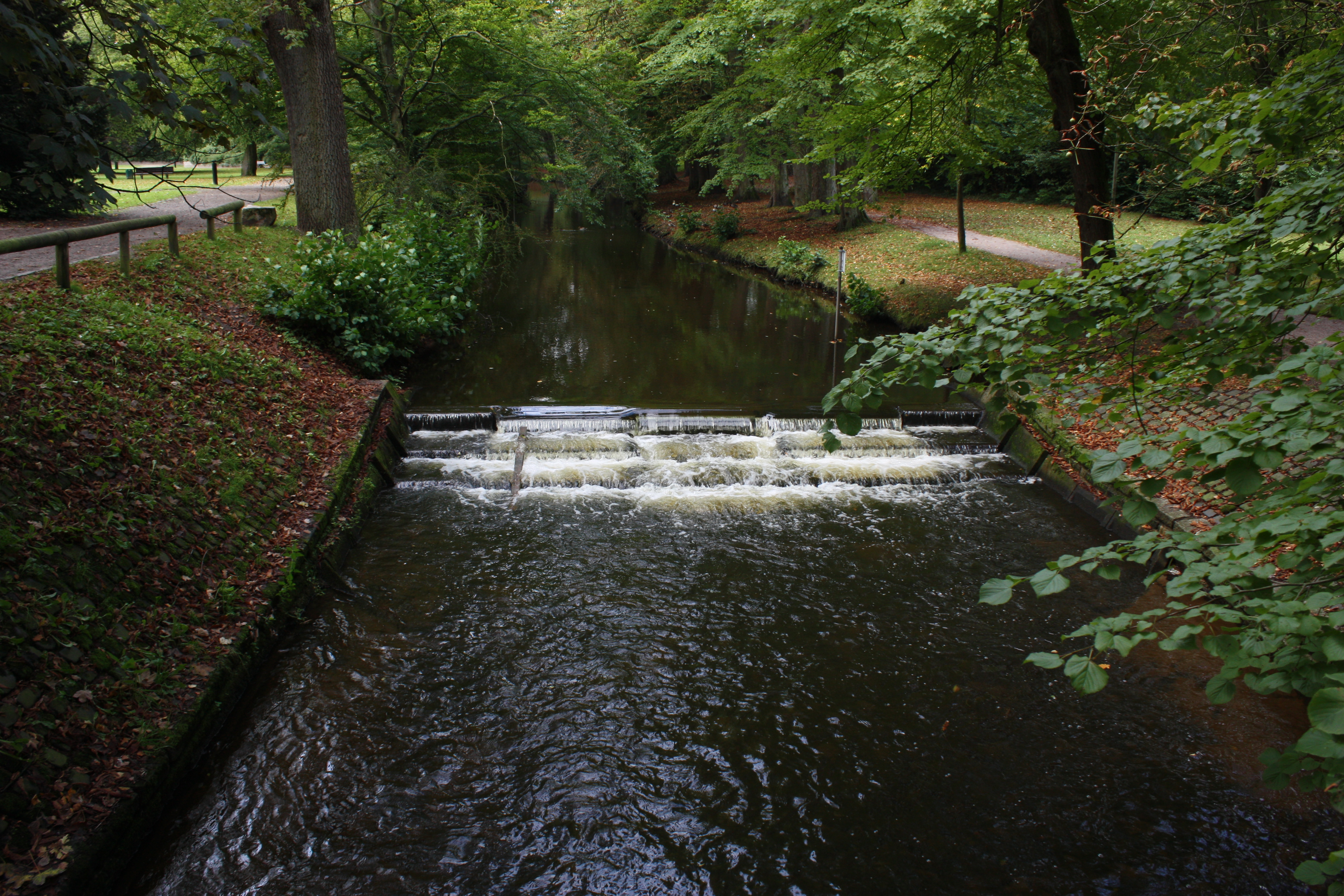 Zeven